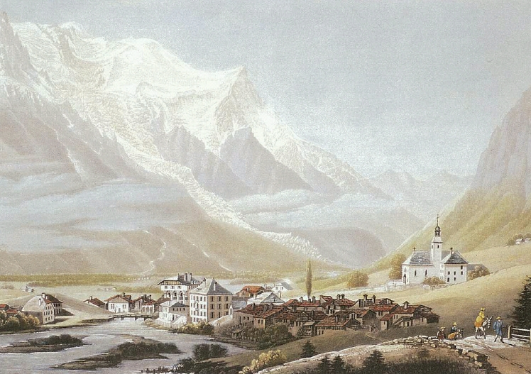 Scan du tableau de Jean Dubois intitulé " Le mont Blanc vu de Chamouni"